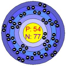 Ксенон атомы